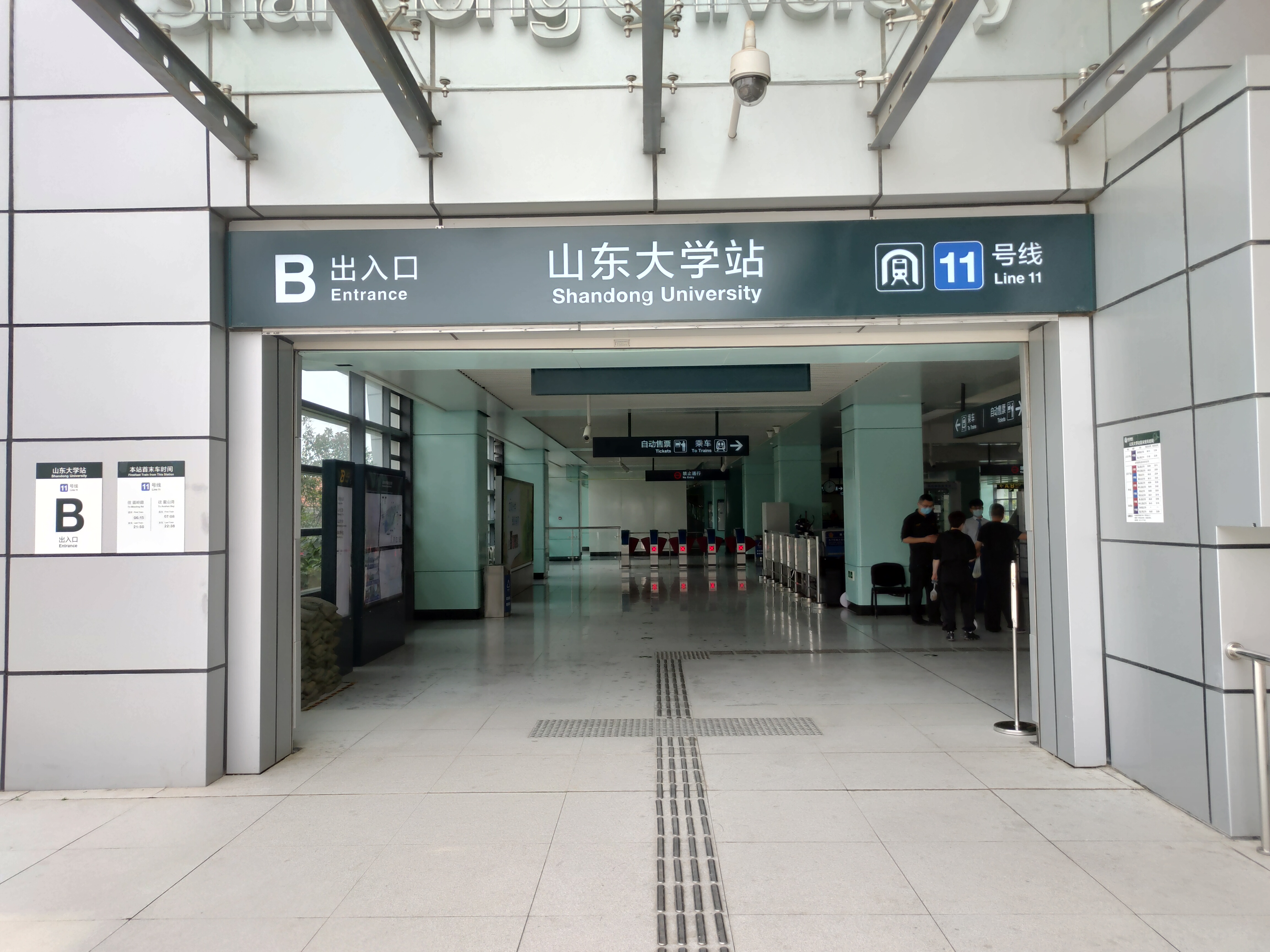 中文（中国大陆）: 青岛地铁11号线山东大学站B出入口